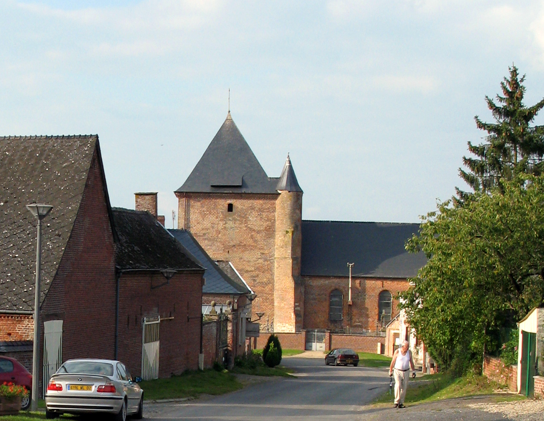 Saint-Algis (Aisne, France) - L'église fortifiée, vue depuis la rue en pente qui pénètre dans le village par le sud.